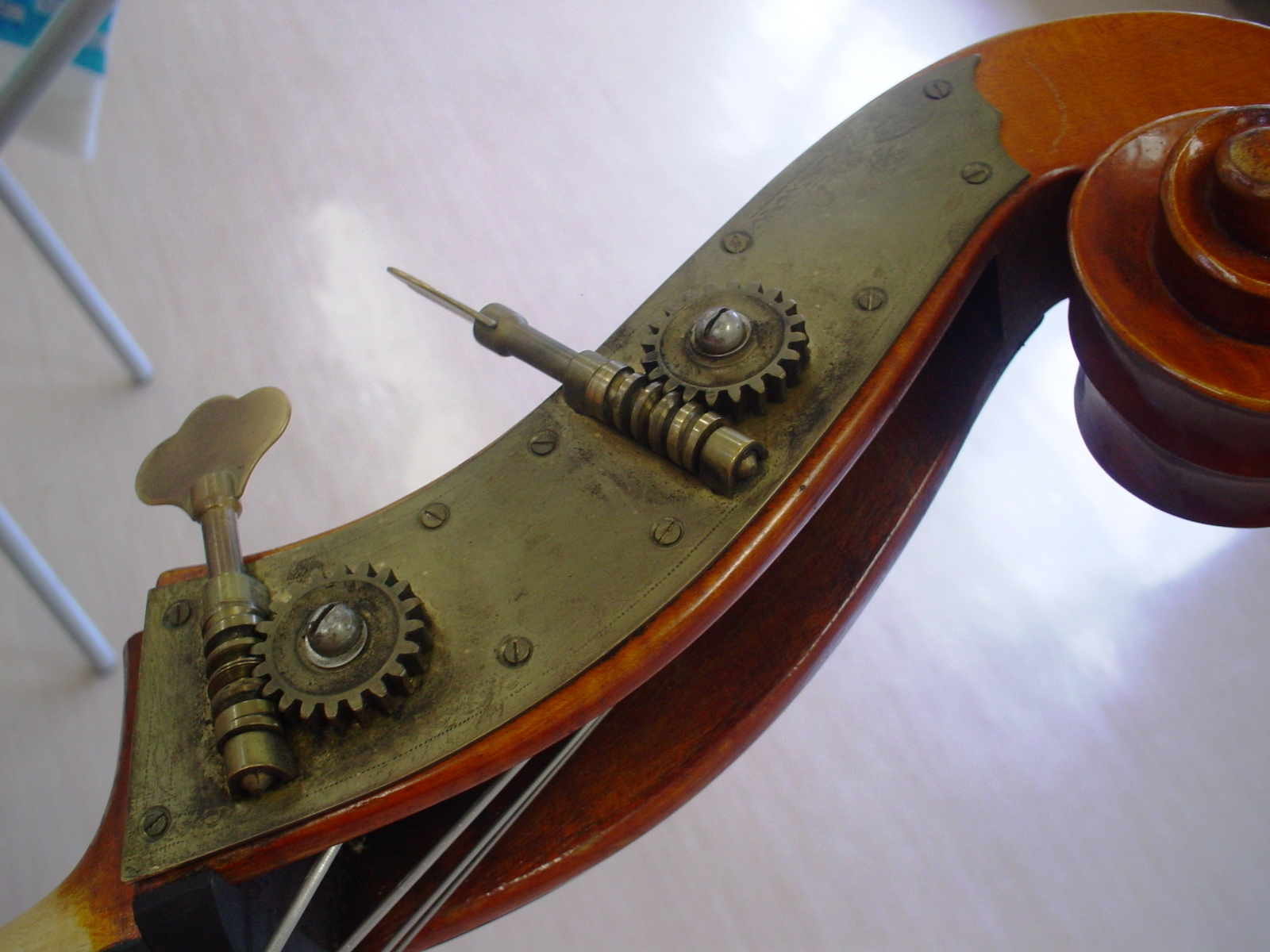 Dispositif mécanique d'accord d'une contrebasse, par roue et vis sans fin. Cliché personnel. Catégorie:organologie Catégorie:engrenage Catégorie:dispositif mécanique Catégorie:Instrument à cordes frottées